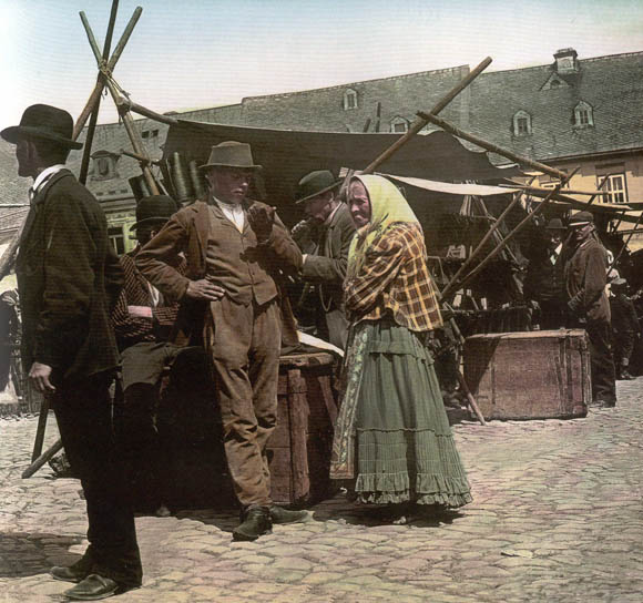 Josef Vejnar: Výroční trh na náměstí v Jilemnici; kolorovaný diapozitiv ze sbírky Krkonošského muzea v Jilemnici